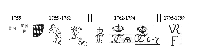 Markentafel der Manufaktur Frankenthal, ausgenommen des PH Stempels wurden die Marken in unterglasurblau ausgeführt.